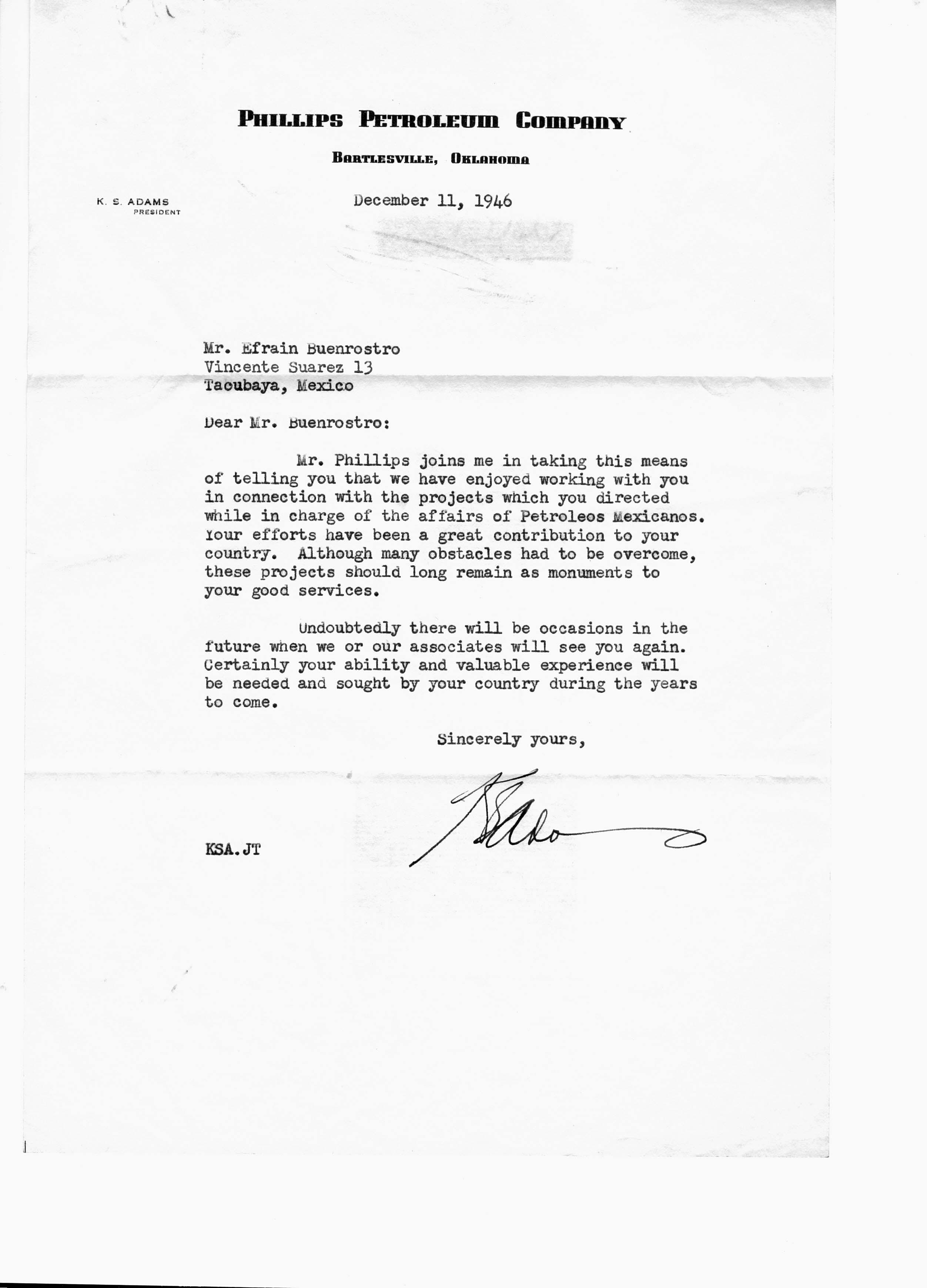 Carta de Phillips Petroleum a Efrain Buenrostro